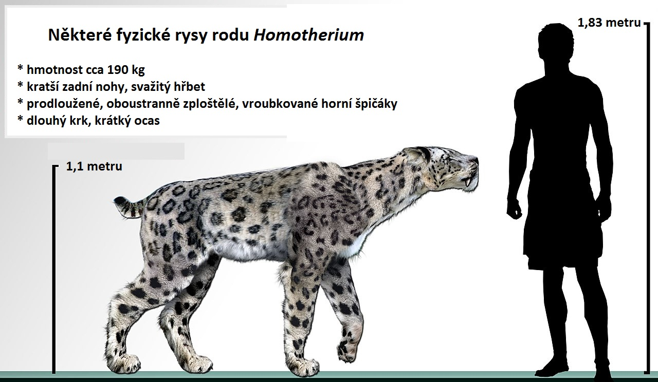 Srovnání fyzické konstituce homotheria a člověka